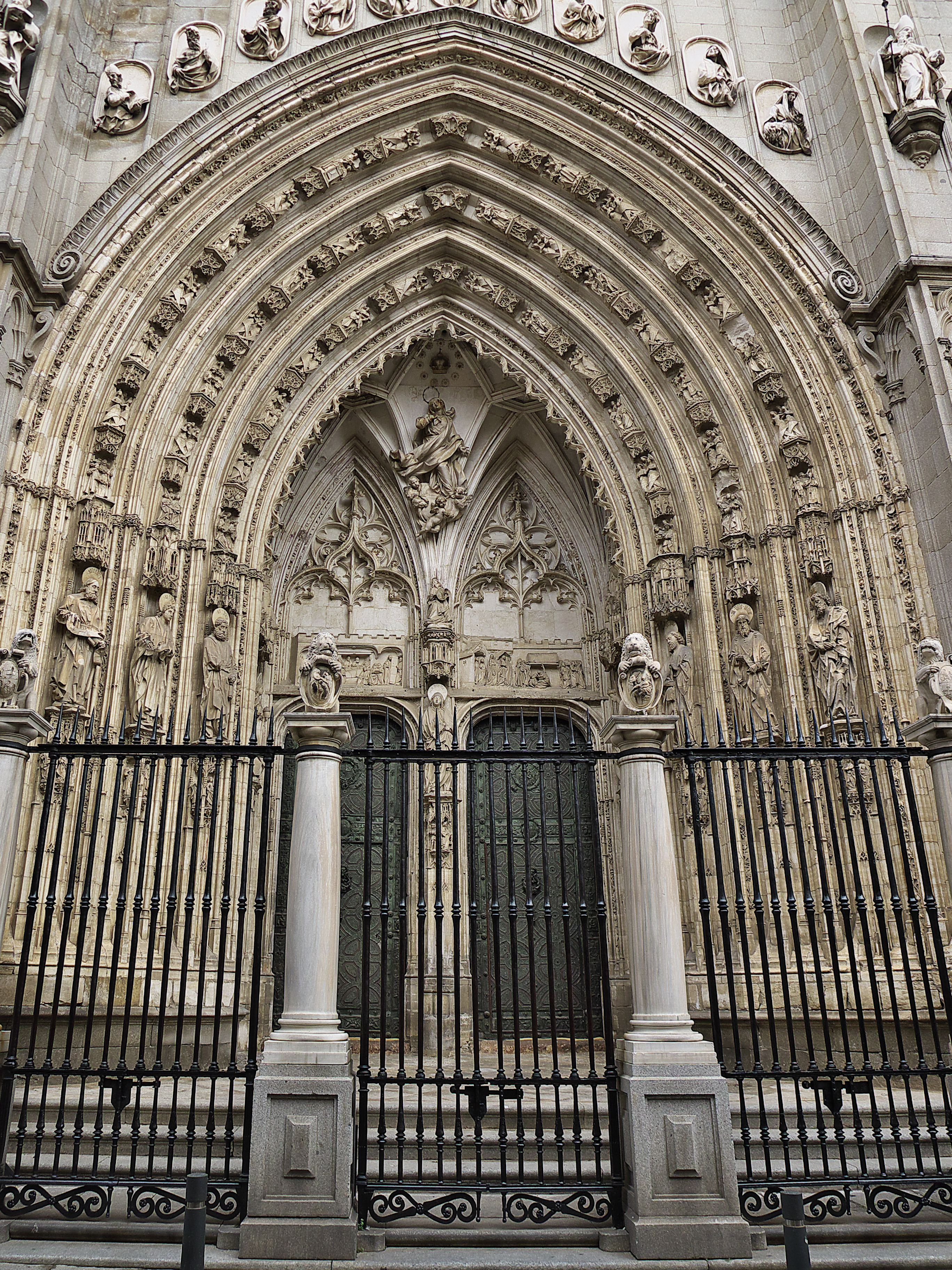 La última puerta que se construye. Levantada en la fachada meridional, también llamada Puerta Nueva (1452-1465). Trazada por el maestre Hanequin de Bruselas, arquitecto y escultor; el oficial Pedro Polido (1452-1453); Egas Cueman, responsable de las esculturas; Pedro Guas y su hijo Juan; y Juan Alemán. Tanto las hojas de la puerta, como la reja, son obras importantes.